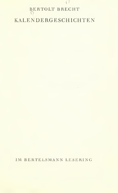 Kalendergeschichten / Bertolt Brecht. - Berlin : Im Bertelsmann Lesering, [19--?]. - 125 p. : ill. ; [15 cm?]. Frontespizio